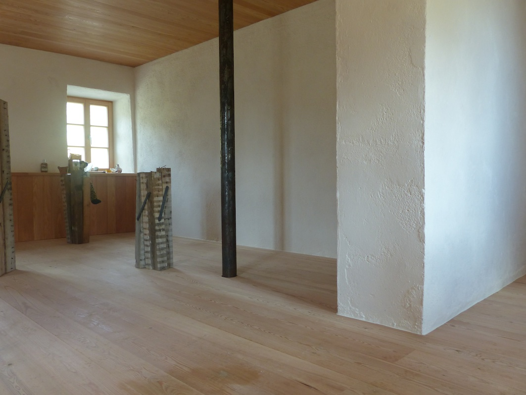 Chamonna Pforzheim (alte Pforzheimer Hütte) neu renoviertes Erdgeschoss